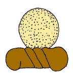 Glifo Náhuatl del municipio de El Arenal, Hidalgo